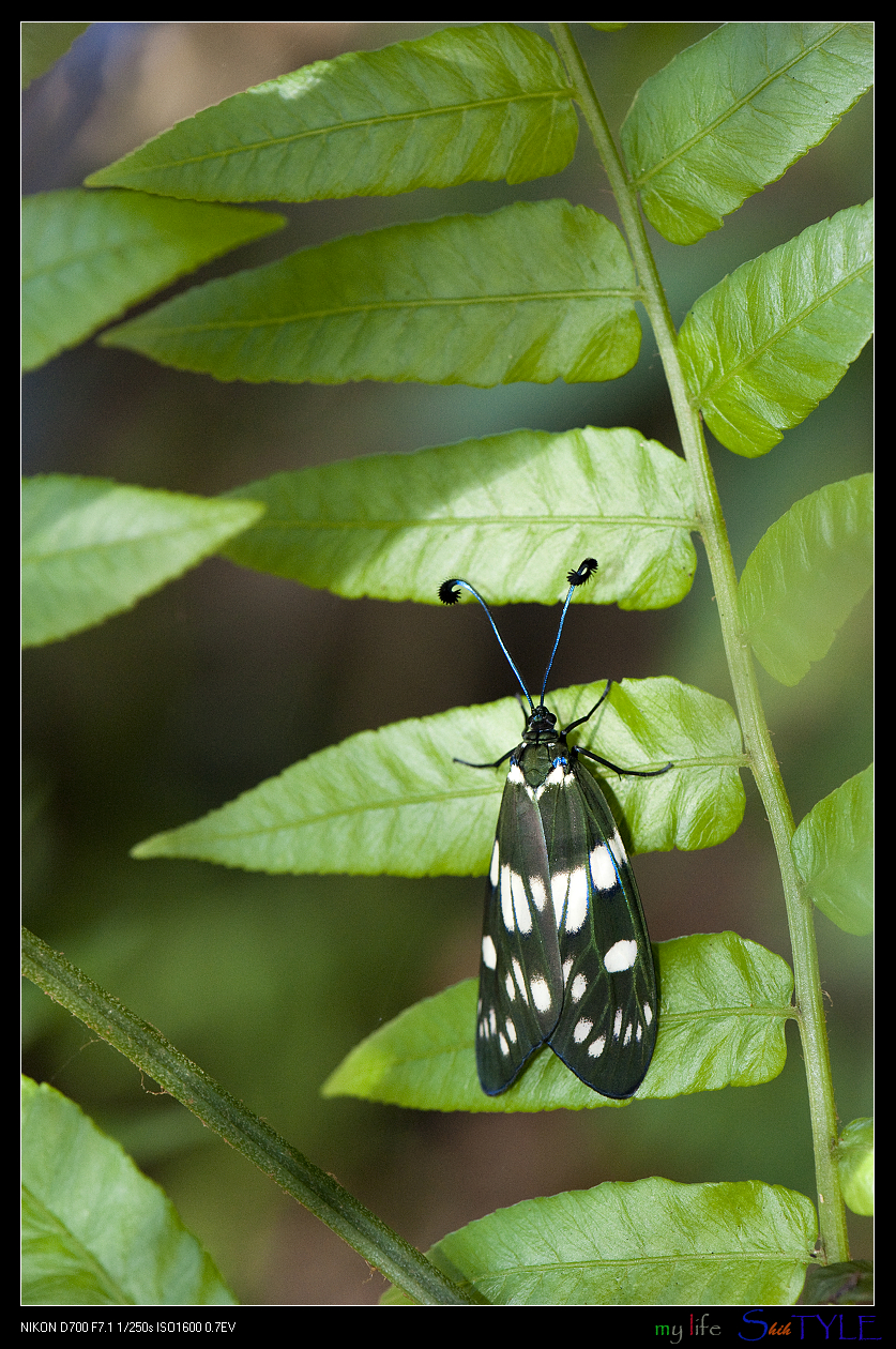 _DSJ1625 Eterusia aedea formosana